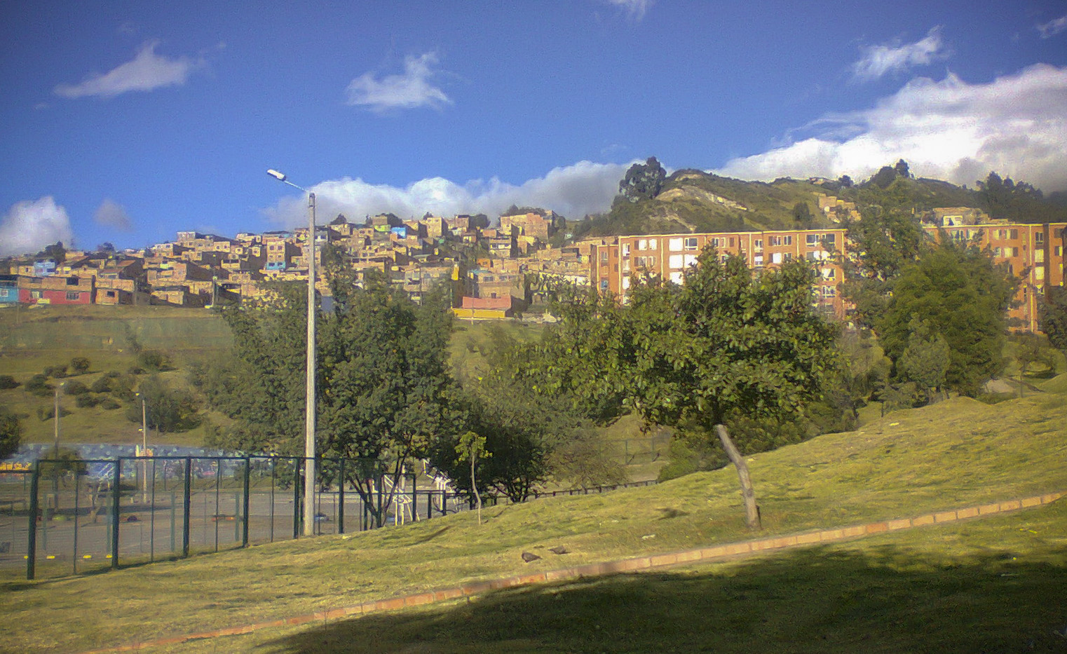 barrios